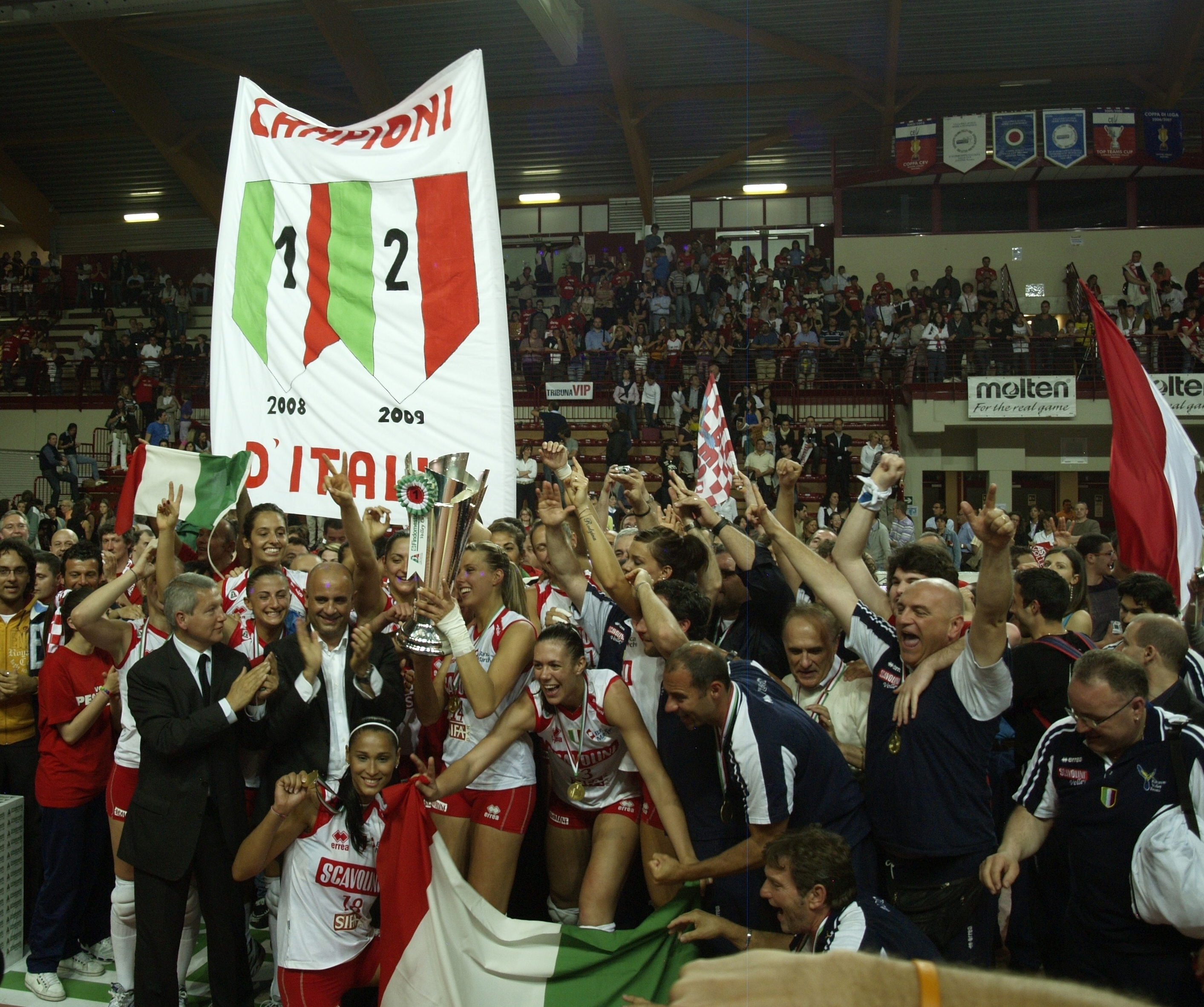 La Scavolini Pesaro festeggia lo scudetto di pallavolo nella stagione 2008-2009